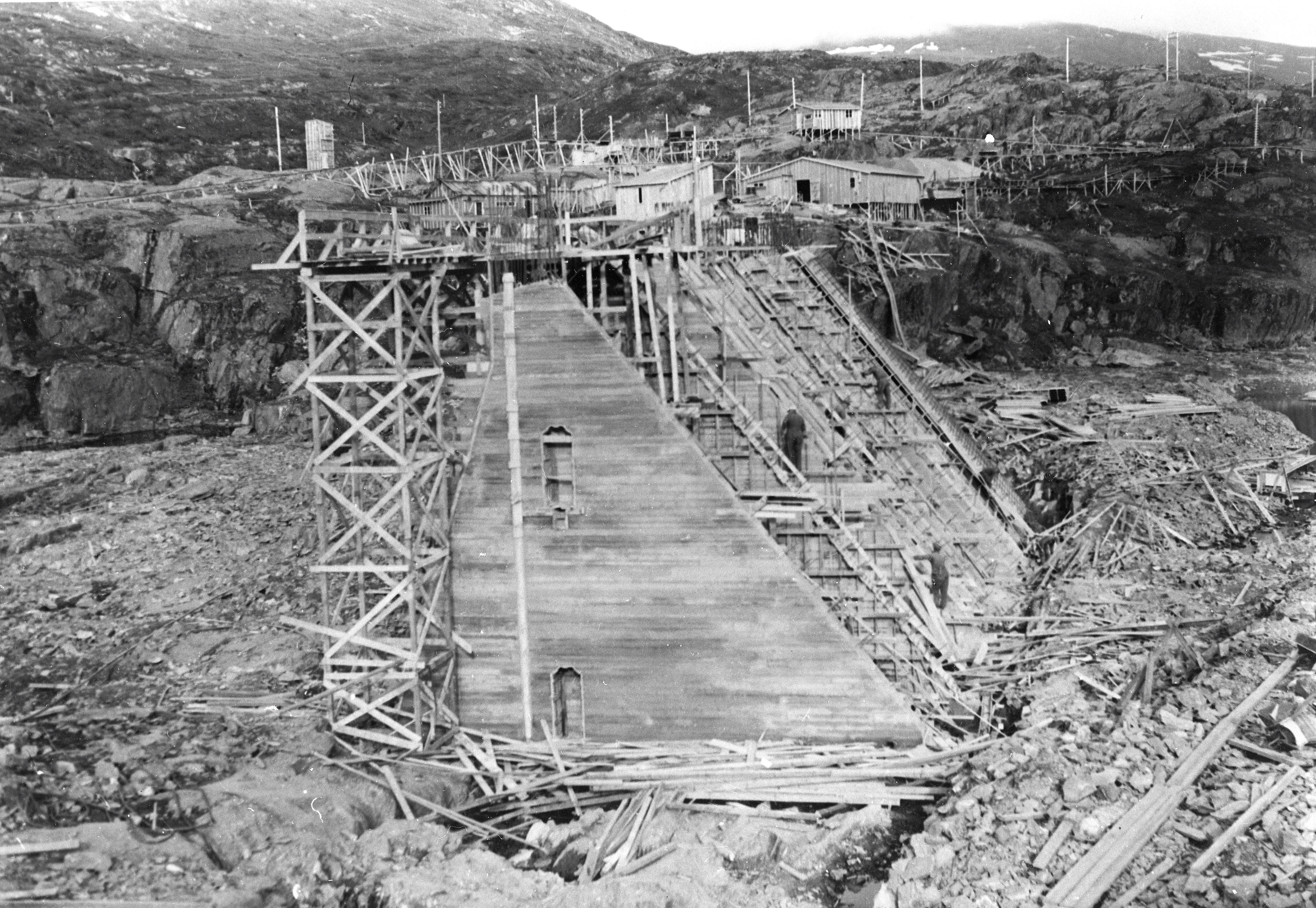 Storglomvatn, dambygging i 1942, Nordland, Noreg.